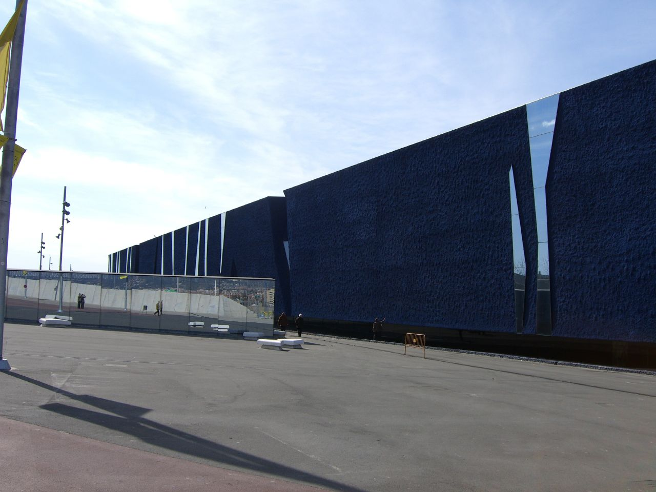 Edificio Fórum, Barcelona, SpainEdifici Fòrum